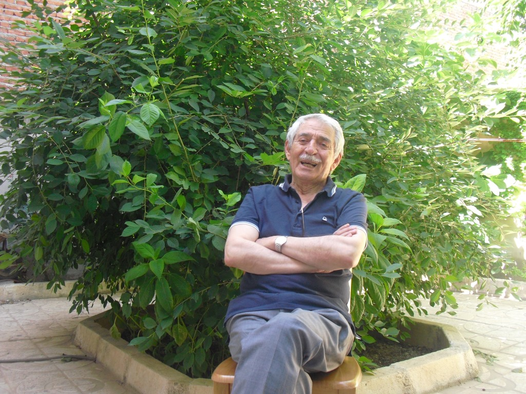 Kurdî: وت‌وێژی کاروان دوورئەندیش له‌گه‌ڵ دوکتۆر عەبدوڵڵا ئه‌بریشه‌می (١١ی پووشپەڕی ١٣٩٢)